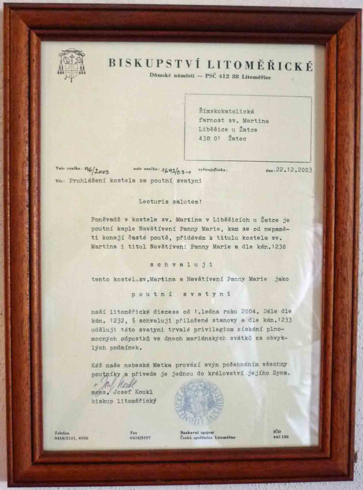 Brief des Altbischofs Koukl zur Bestätigung der Wallfahrtskirche in Liebeschitz (Liběšice)